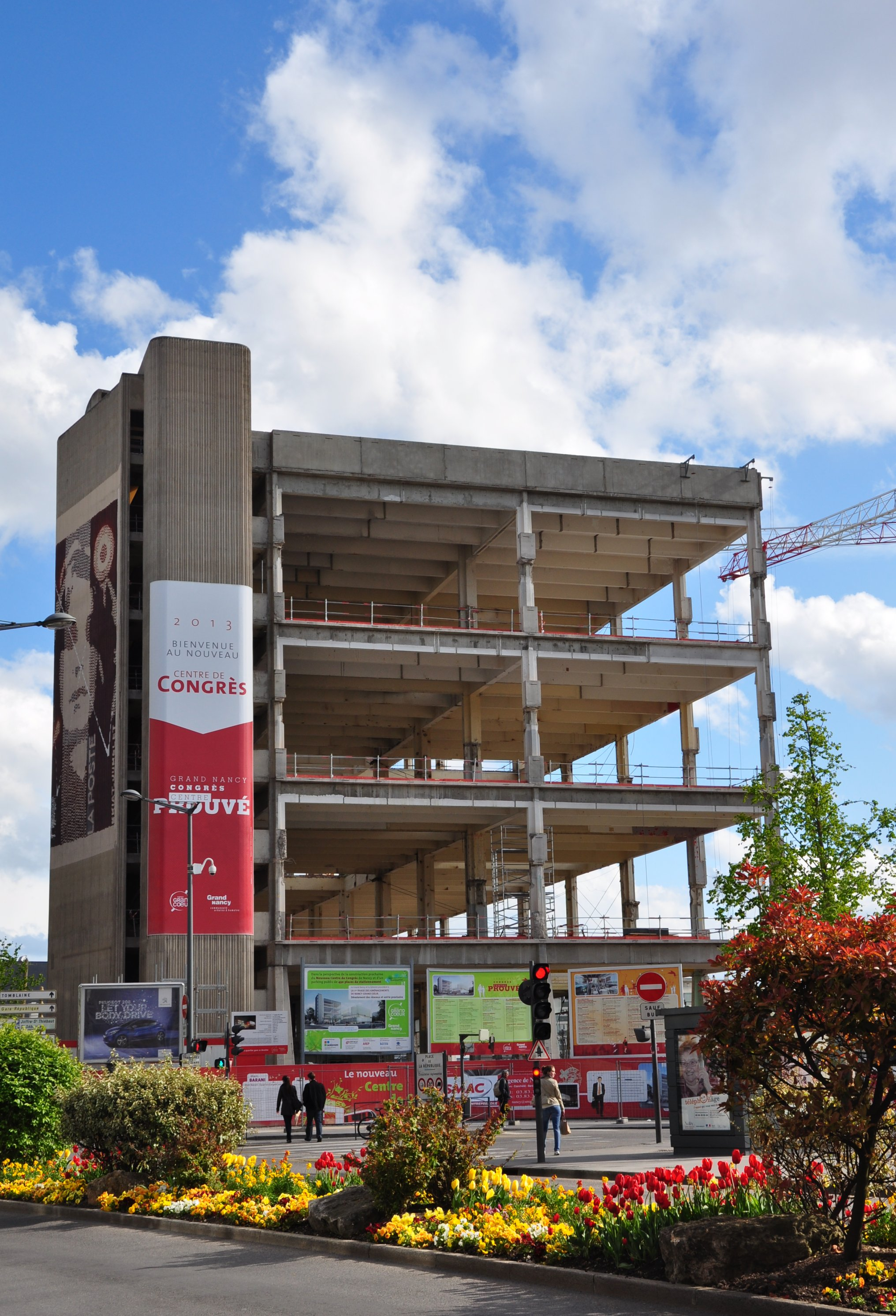 L'ancien centre de tri de Nancy centre, en cours de travaux pour transformation en centre des congrès